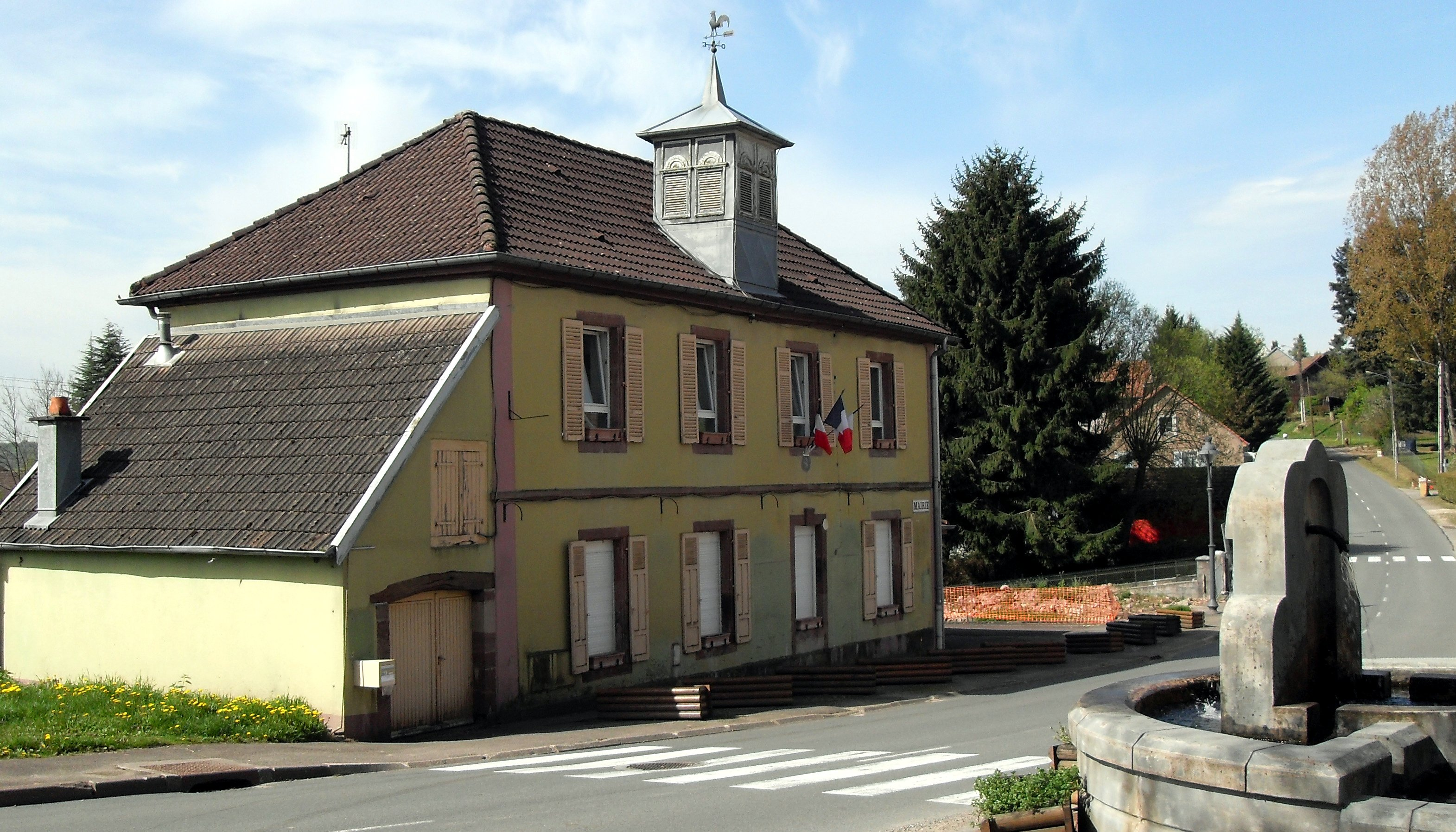 La mairie de Vétrigne